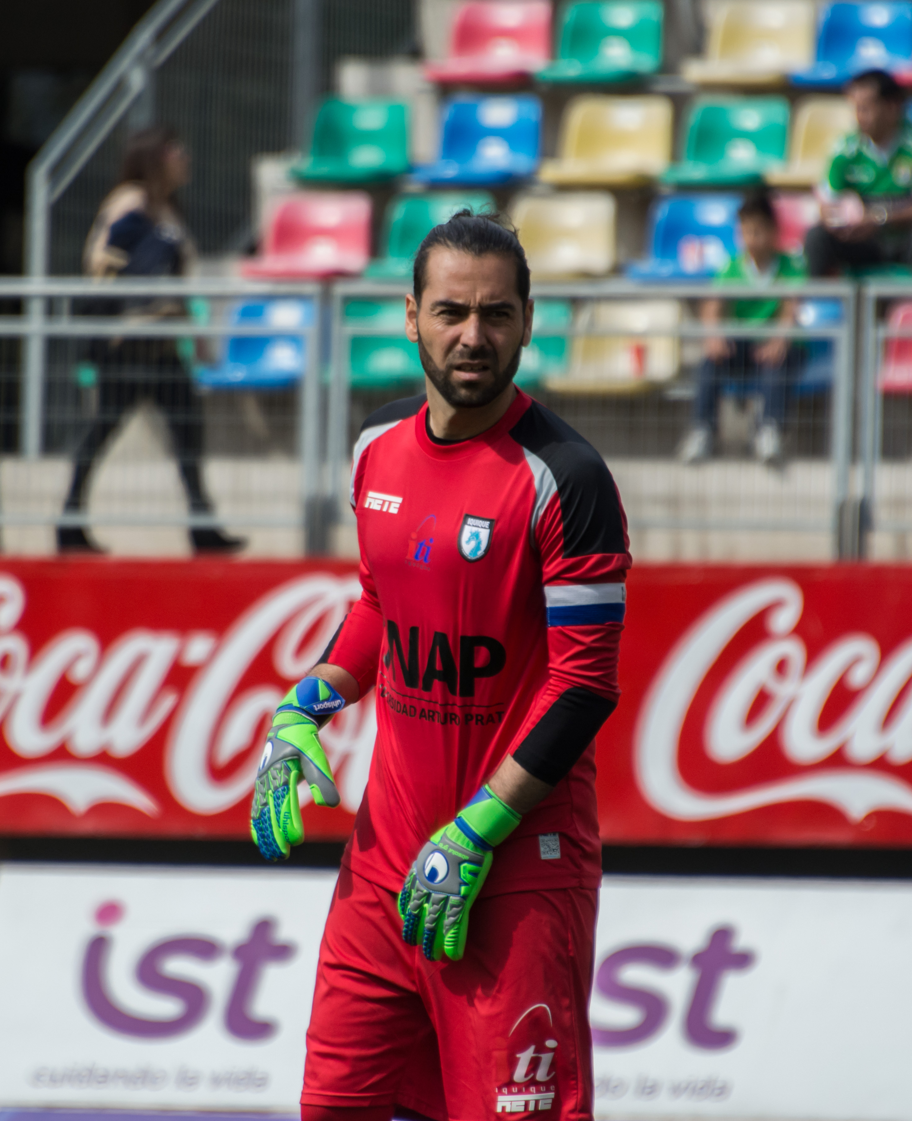 Rodrigo Naranjo, Audax Italiano v Deportes Iquique, Estadio Bicentenario de La Florida, La Florida, Santiago, Chile